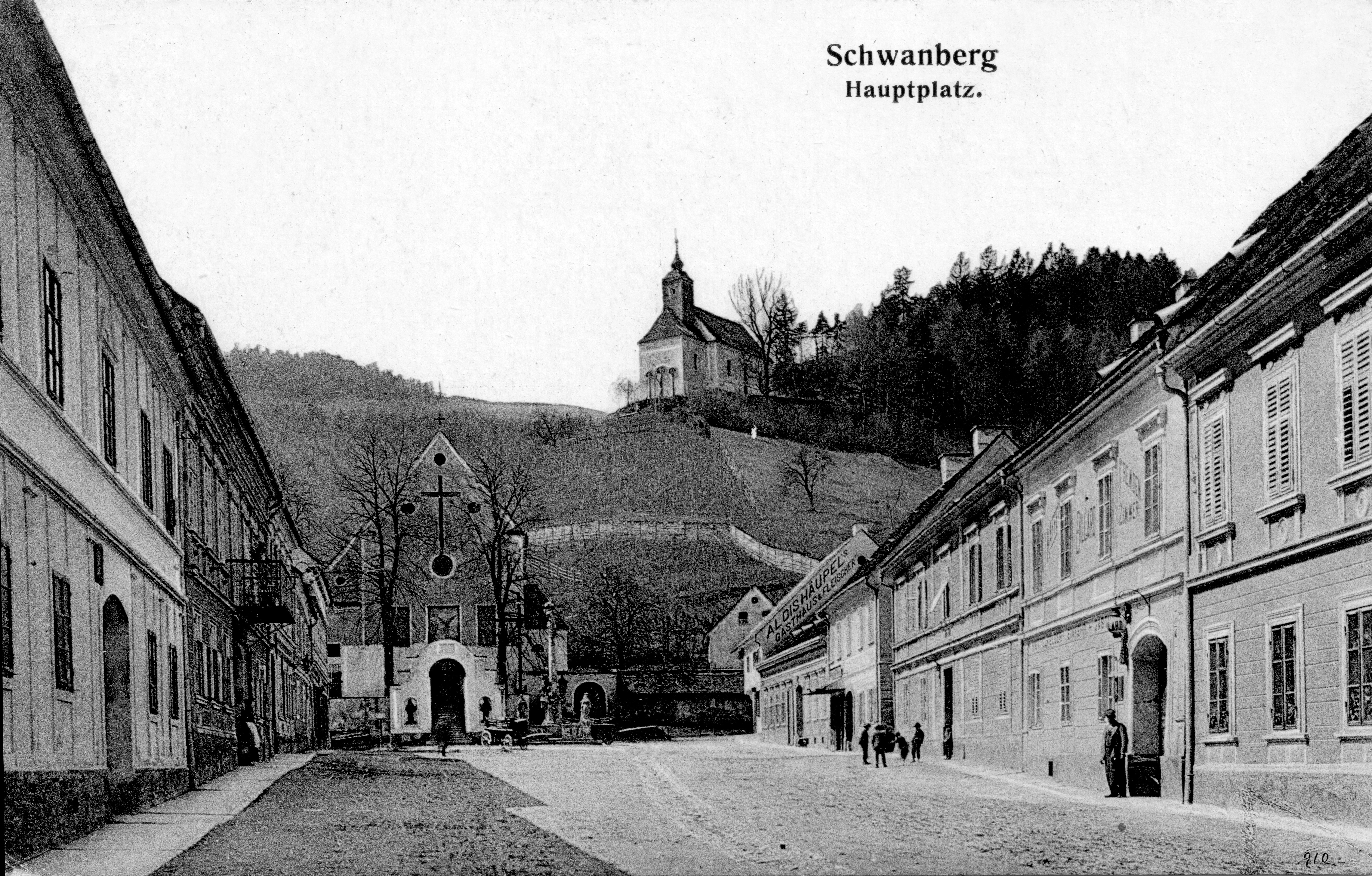 Hauptplatz von Schwanberg, Steiermark, Österreich 1980 mit Kapuzinerkloster und St. Josefs-Kirche